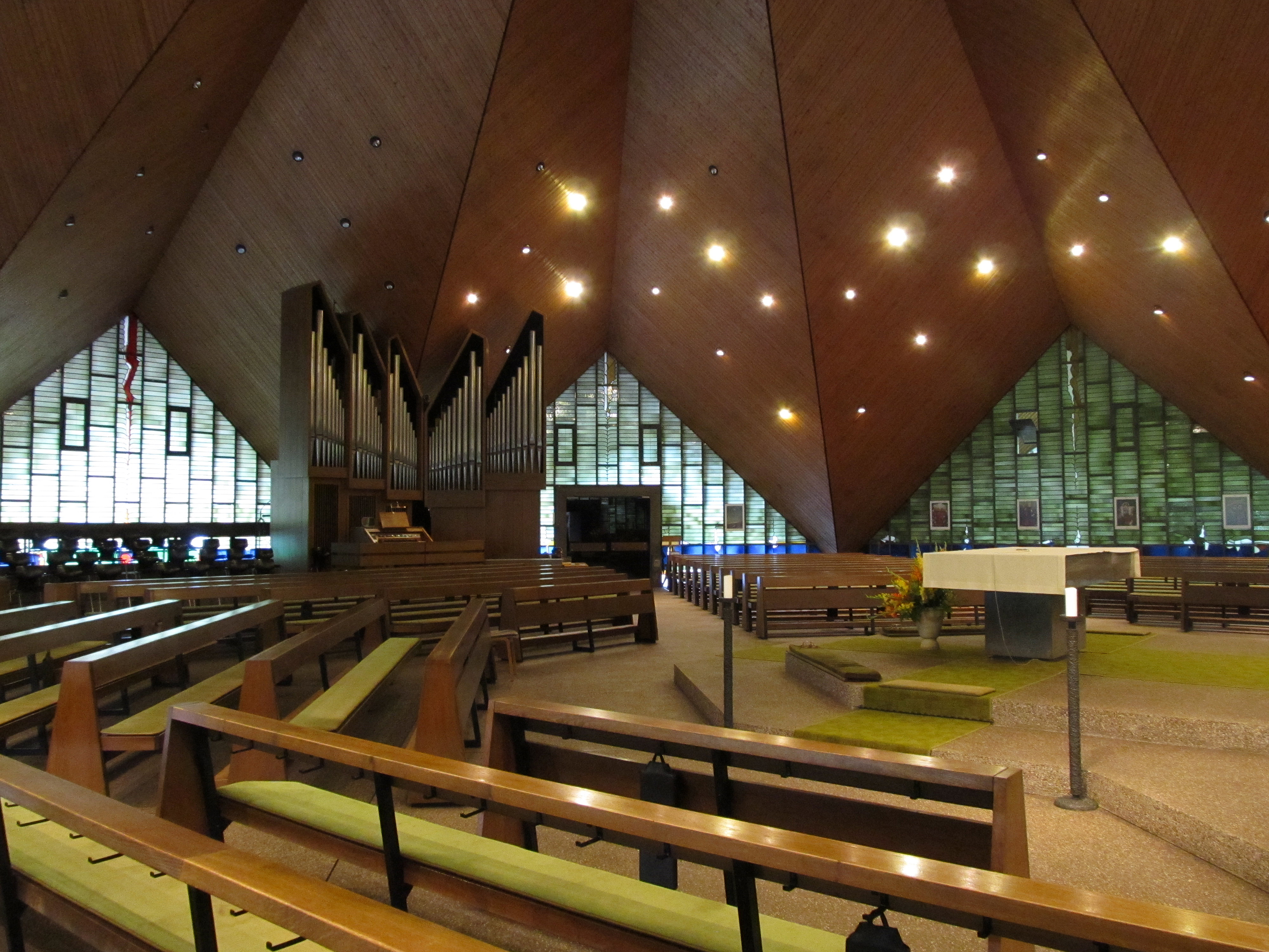 Blick ins innere der katholischen Pfarrkirche St. Michael in St. Ingbert, Saarland